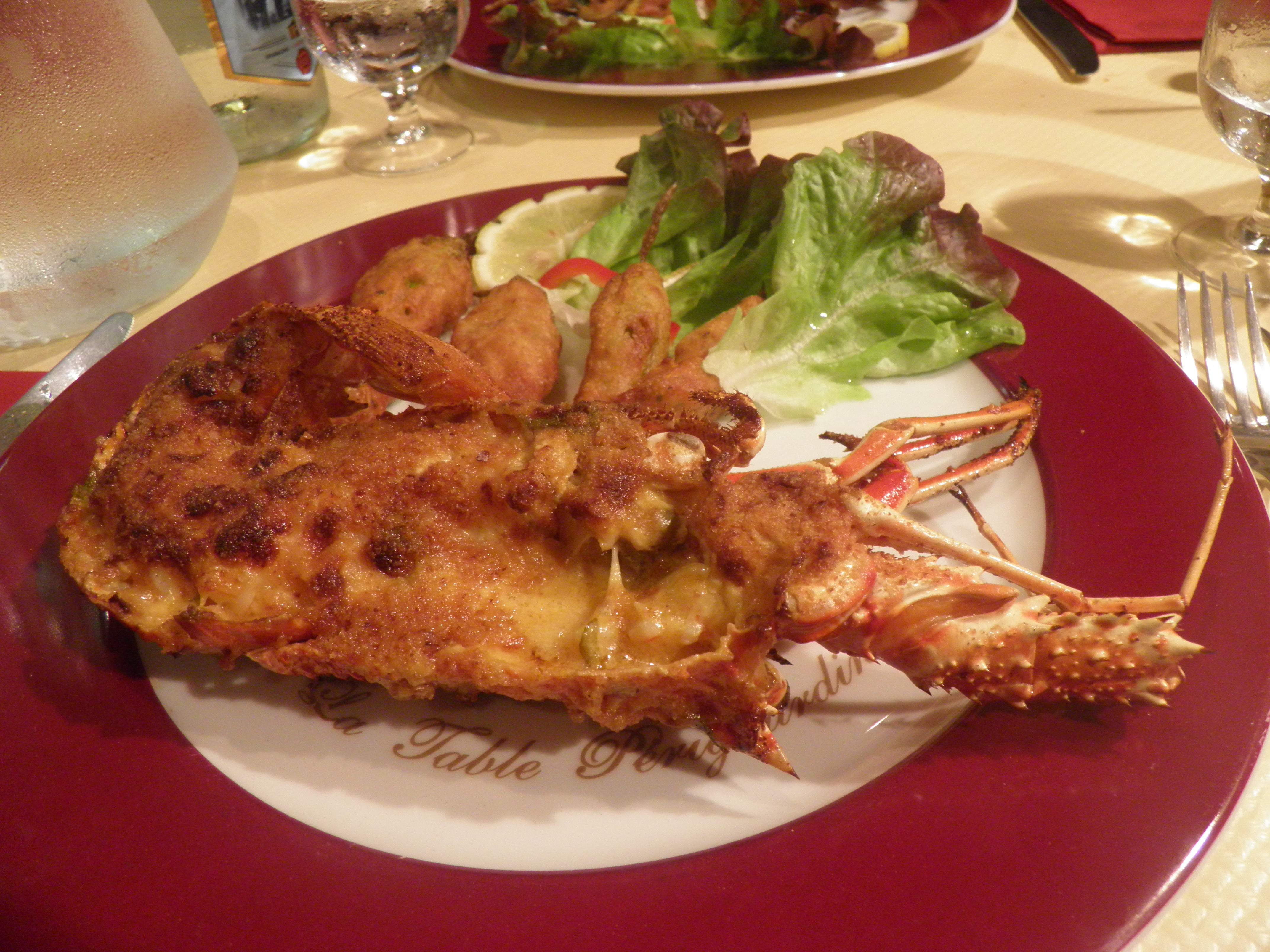 Langouste au restaurant à Canari (Haute-Corse, France).